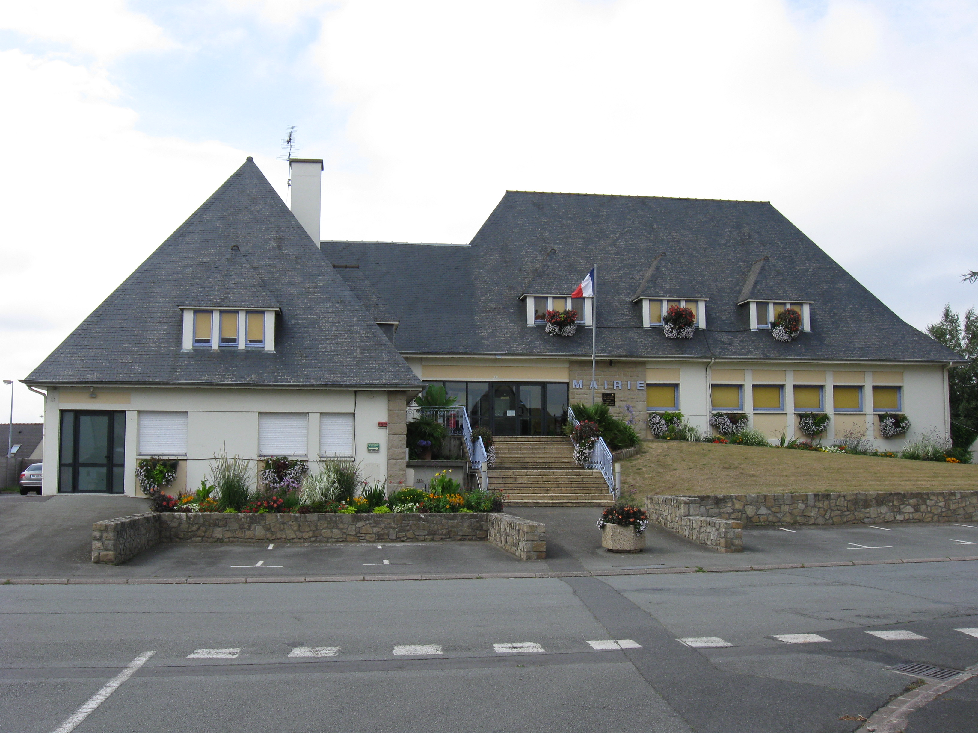 Mairie de Créhen. (Département des Côtes-d'Armor, région Bretagne).